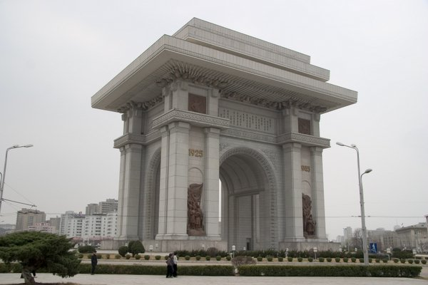 triumph_gate in Pyongyan